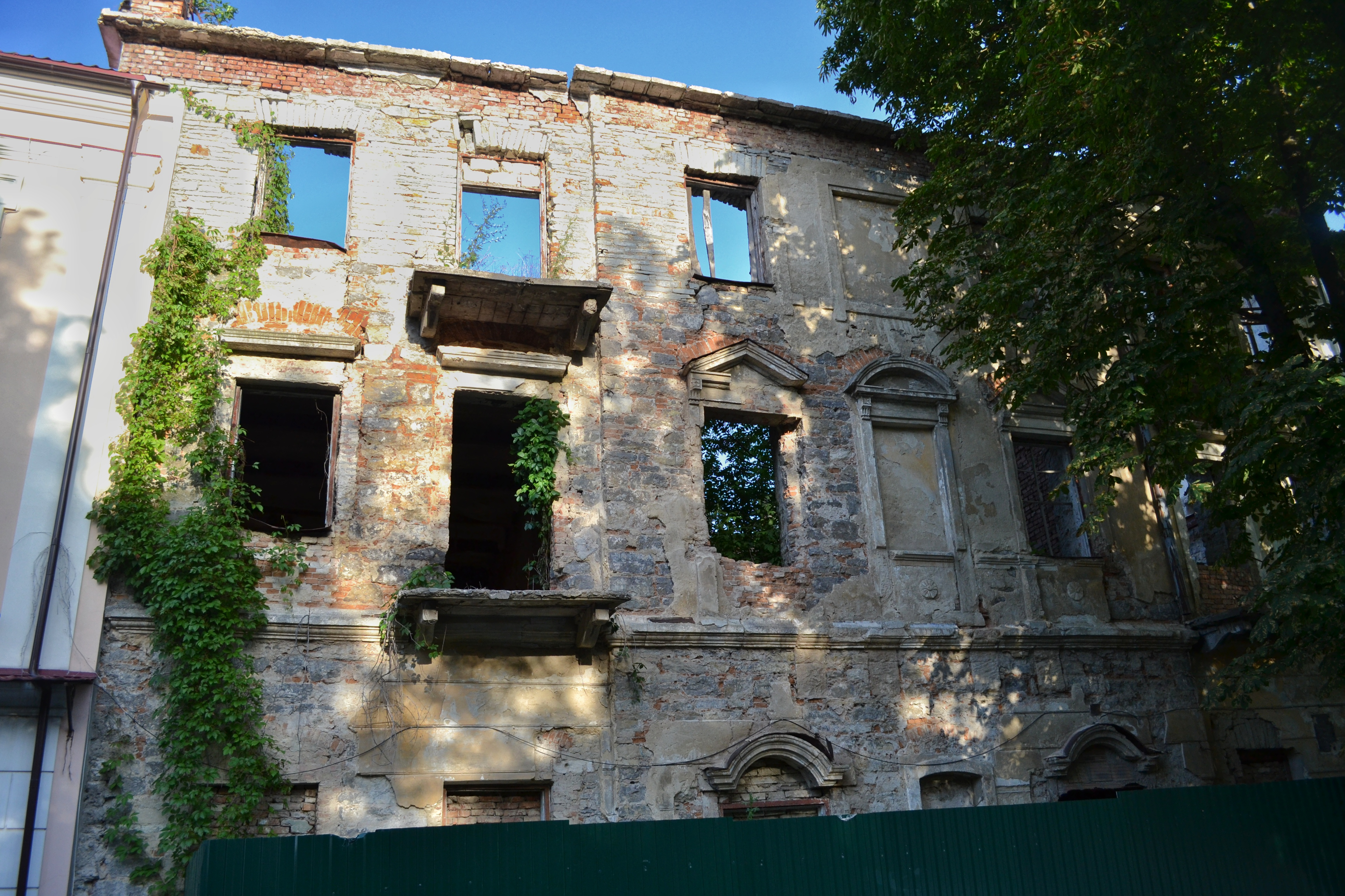 Вірменський житловий будинок.